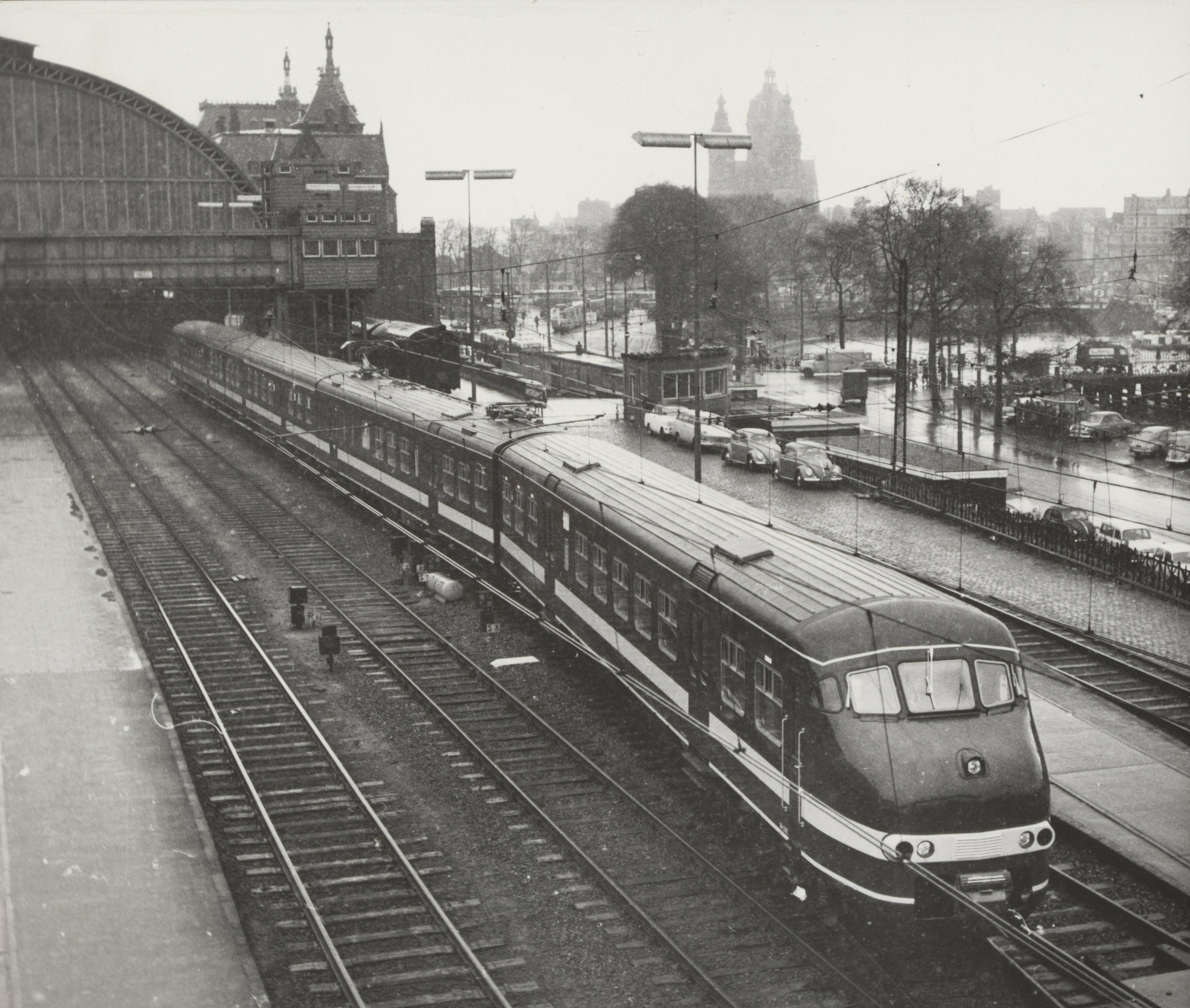 Collectie / Archief : Fotocollectie Elsevier Reportage / Serie : [ onbekend ] Beschrijving : spoorwegen, treinen, Centraal Station Datum : 6 februari 1964 Locatie : Amsterdam, Noord-Holland Trefwoorden : spoorwegen, treinen Persoonsnaam : Centraal Station Fotograaf : Pot, Harry / Anefo Auteursrechthebbende : Nationaal Archief Materiaalsoort : Foto (zwart/wit) Nummer archiefinventaris : bekijk toegang 2.24.05.02 Bestanddeelnummer : 056-0629 Reacties Geplaatst door Treinreizigster op 13 oktober 2017 - 22:36. Het nieuwe Treinstel Toekomst (Plan T 501), vierwagentreinstel.